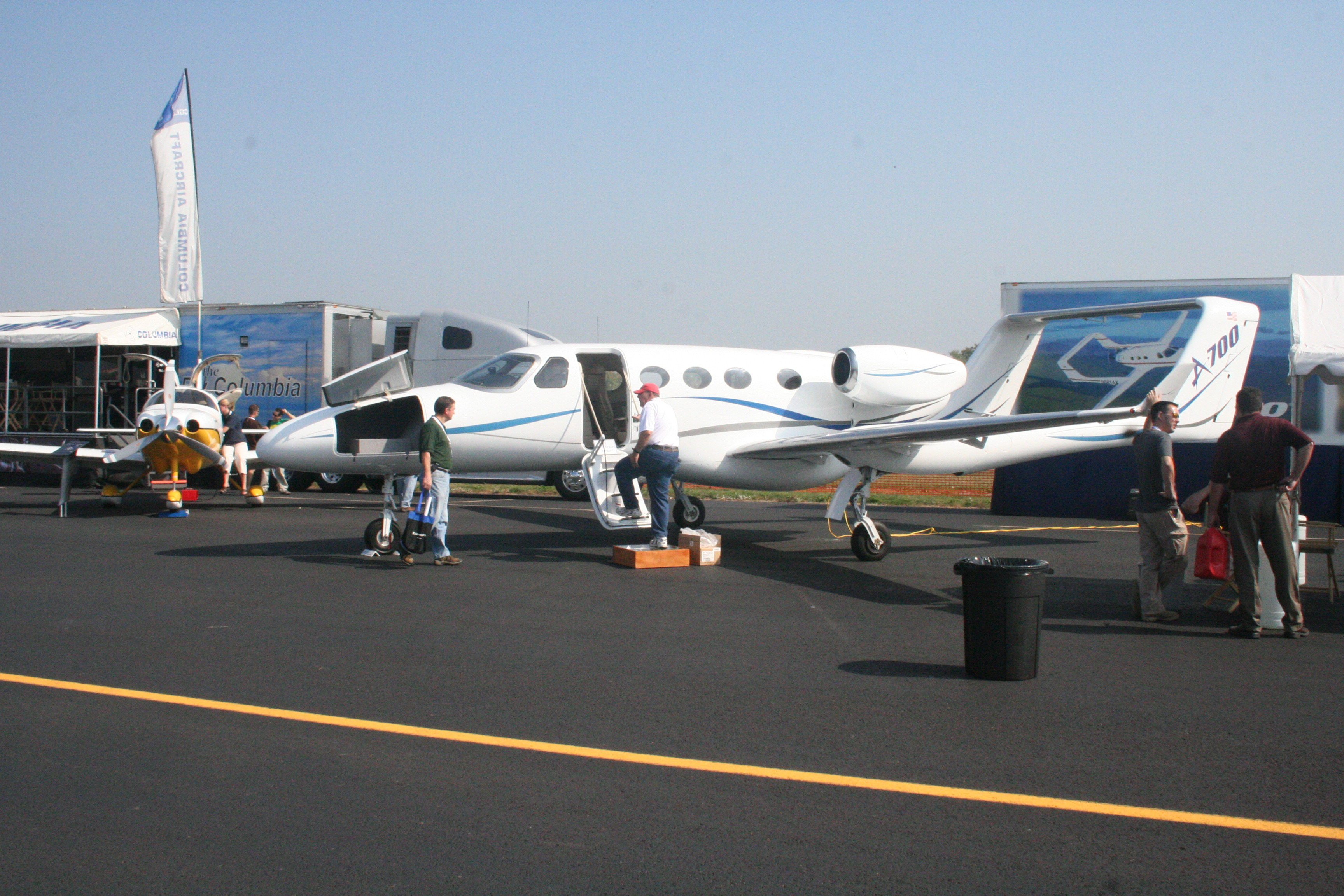 Small airplane, model Adam 700, on tarmac.